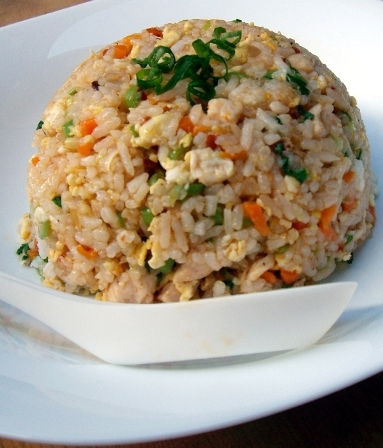 Chahan